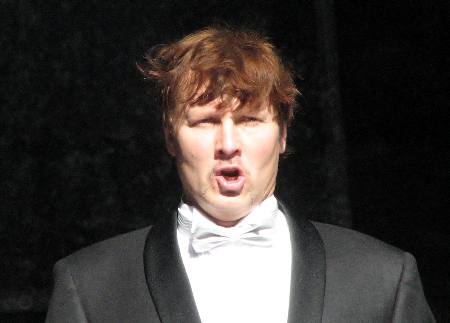 Aare Saal esinemas Estonia teatri 107. hooaja avamisel